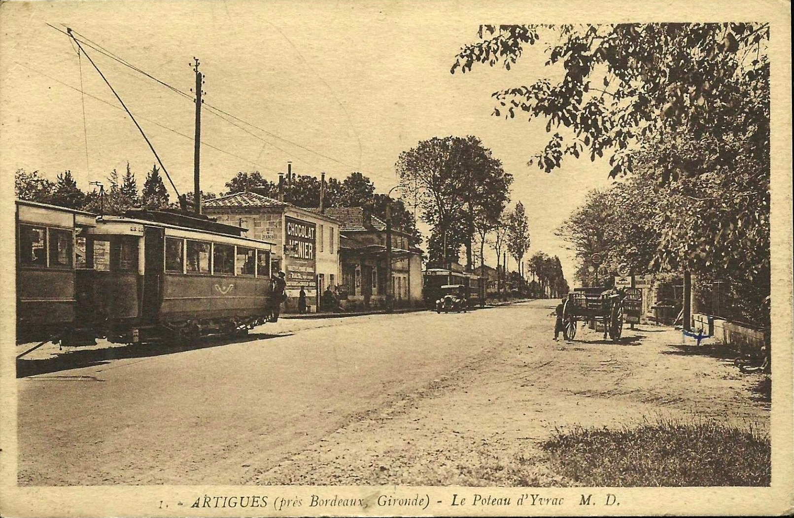 Yvrac